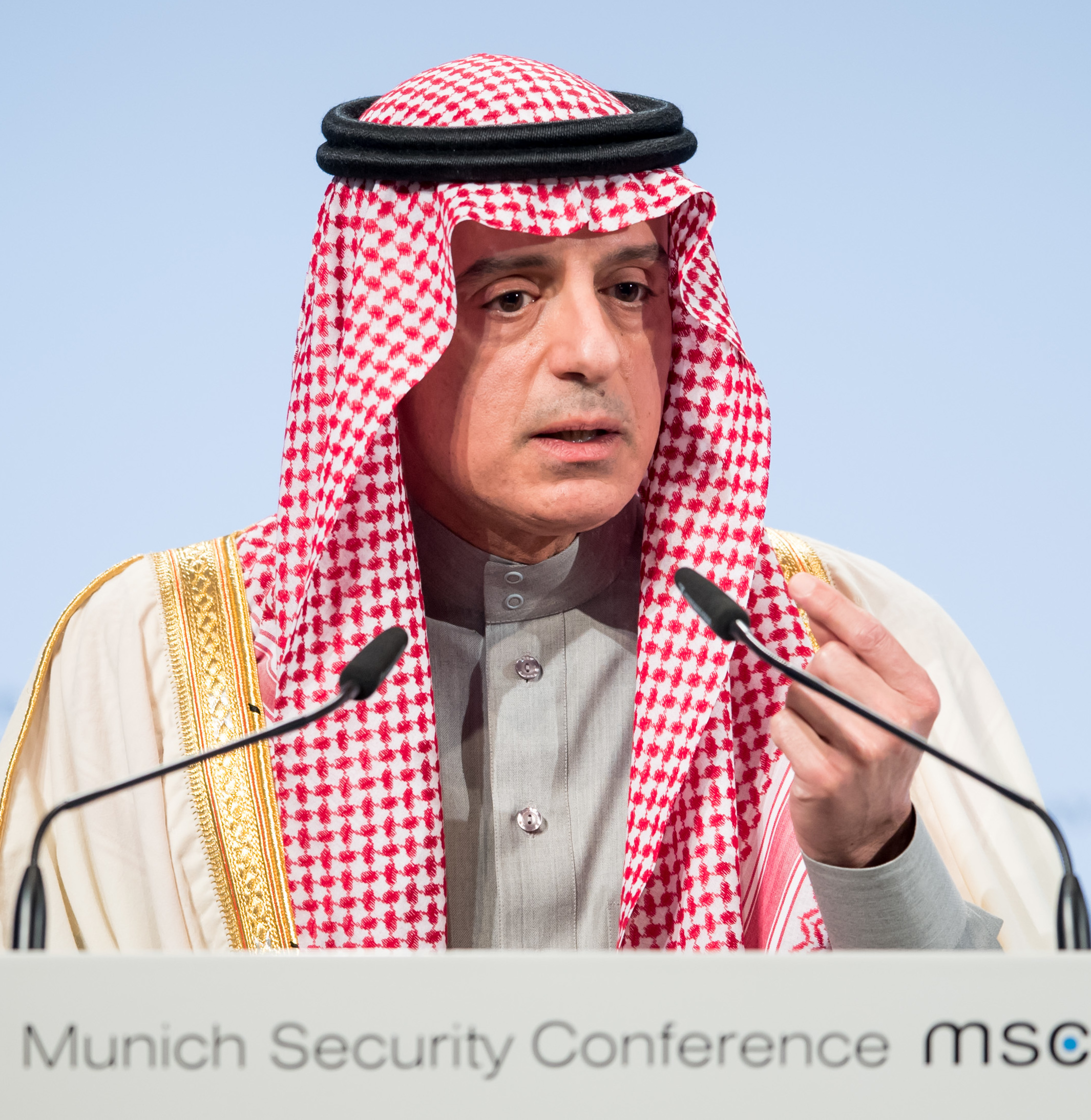 Adel bin Ahmed Al-Jubeir während der Münchener Sicherheitskonferenz 2018